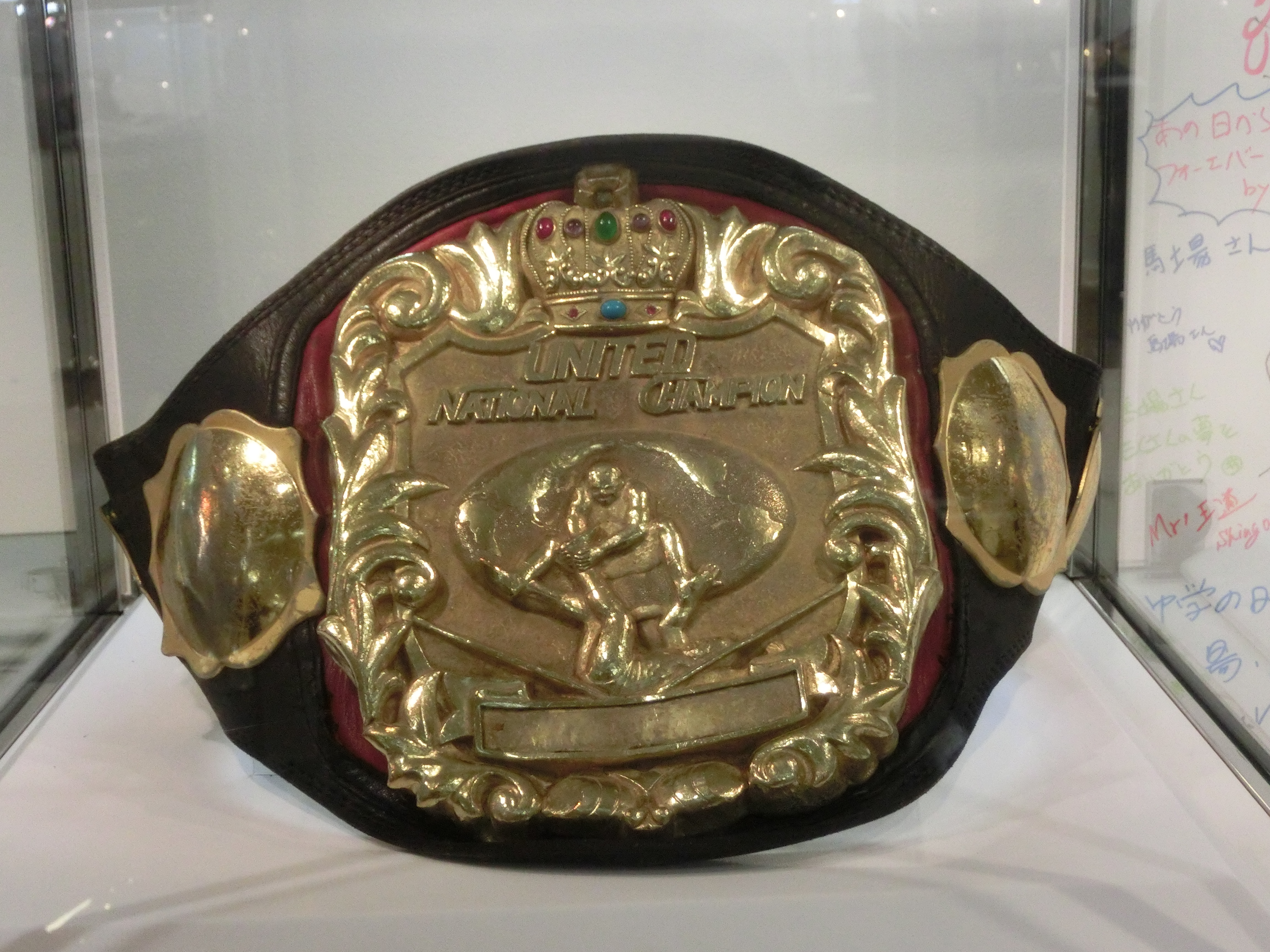 ユナイテッド・ナショナル・ヘビー級王座（1970年制作）渋谷「ジャイアント馬場 20thメモリアル. ～ジャイアント馬場展」撮影（2019年）